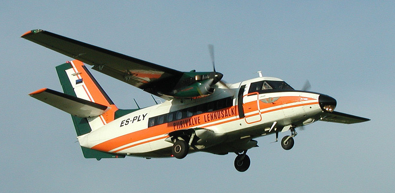 Piirivalve Lennusalga Let L-410 UVP maandumas Pärnu lennuvälja rajale 21 Parasummer 2005 raames.